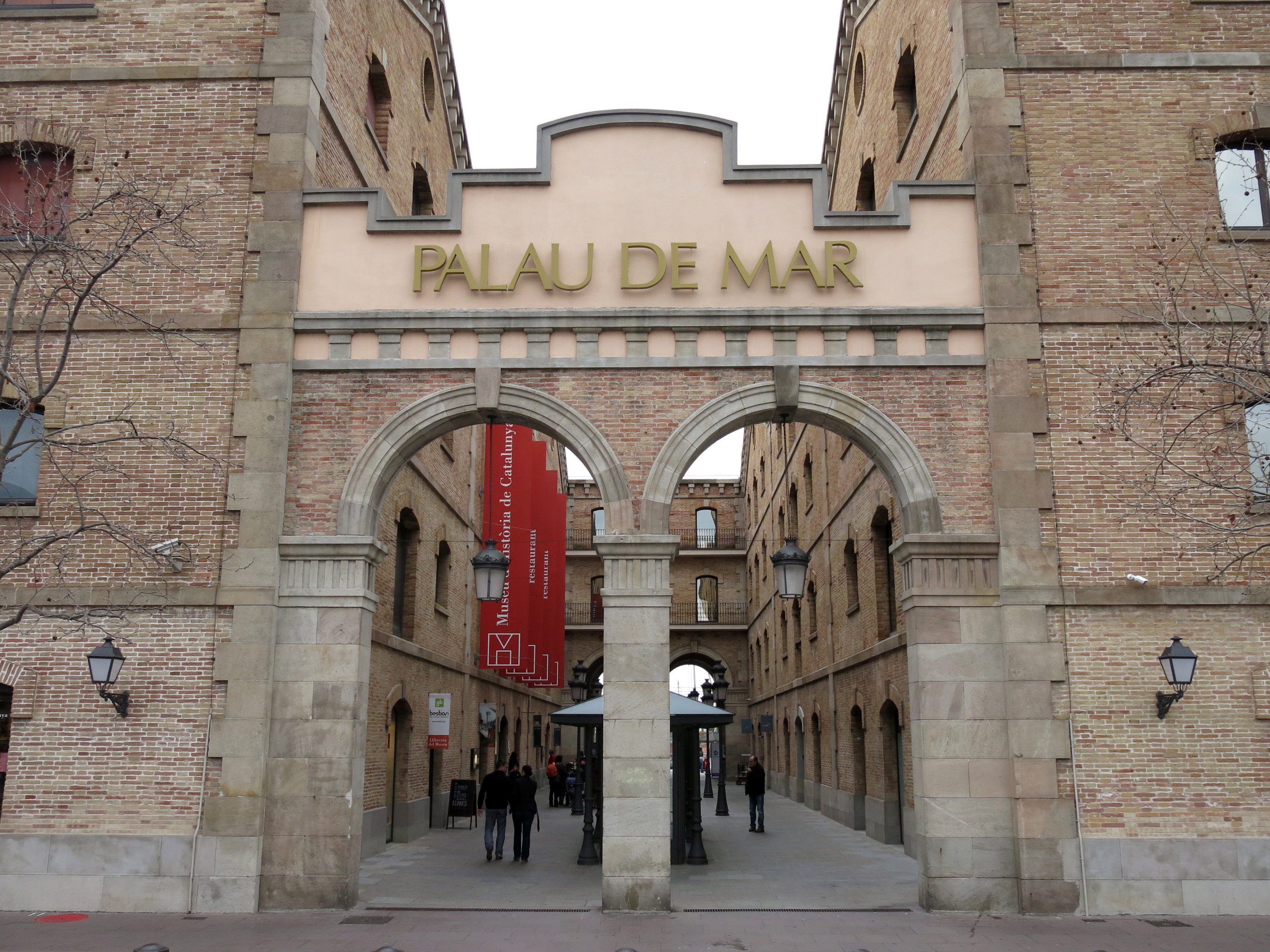 Magatzems generals del Dipòsit (Barcelona). Inclouen el Museu d'Història de Catalunya